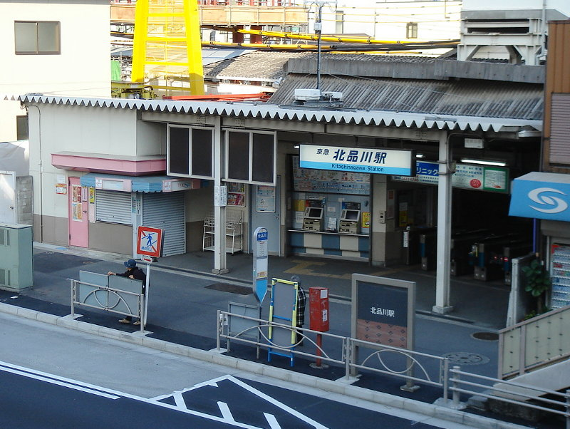 京急本線ja:北品川駅 駅舎 投稿者↑PON（ウエポン）が2007年1月8日に撮影 一部編集の上で2007年2月1日にアップロード